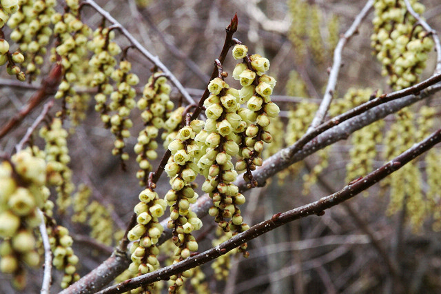 キブシ （山梨県山中湖村）Stachuurus praecox (Yamanakako-Village, Yamanashi, JAPAN)